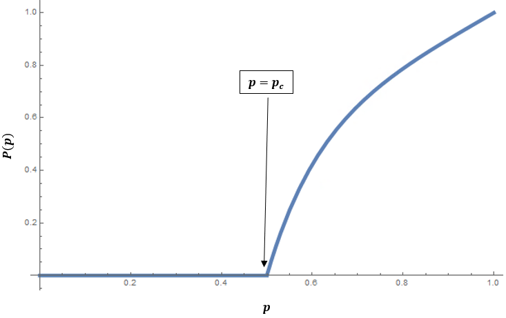 מעבר הפאזה של פרמטר הסדר במודל בתה עם Z=3